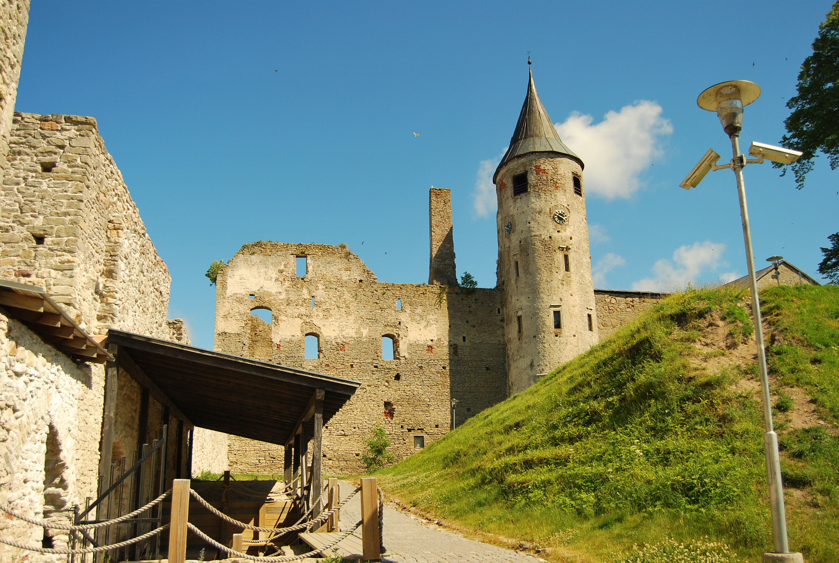 Haapsalu Piiskopilinnuse konvendihoone läänetiiva Vahitorn